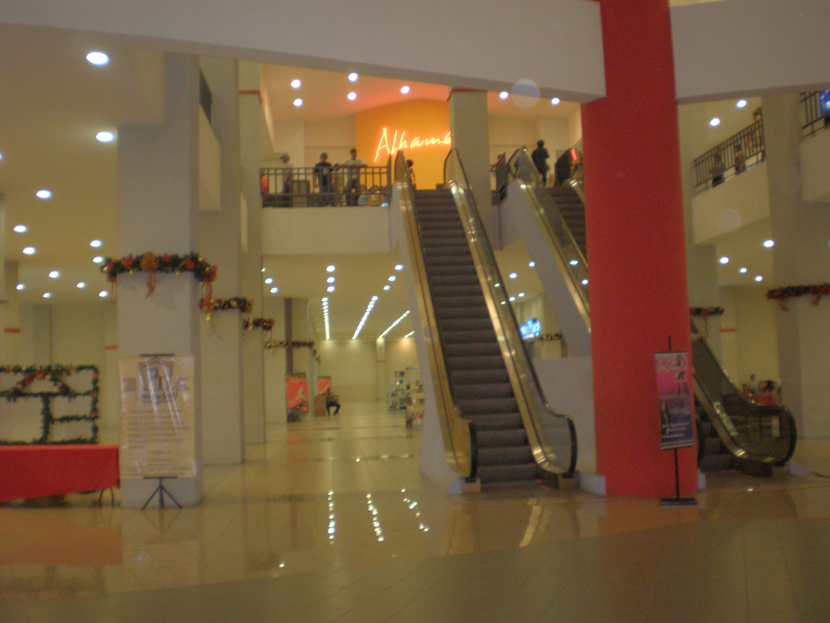 Multicentro Las Americas Managua